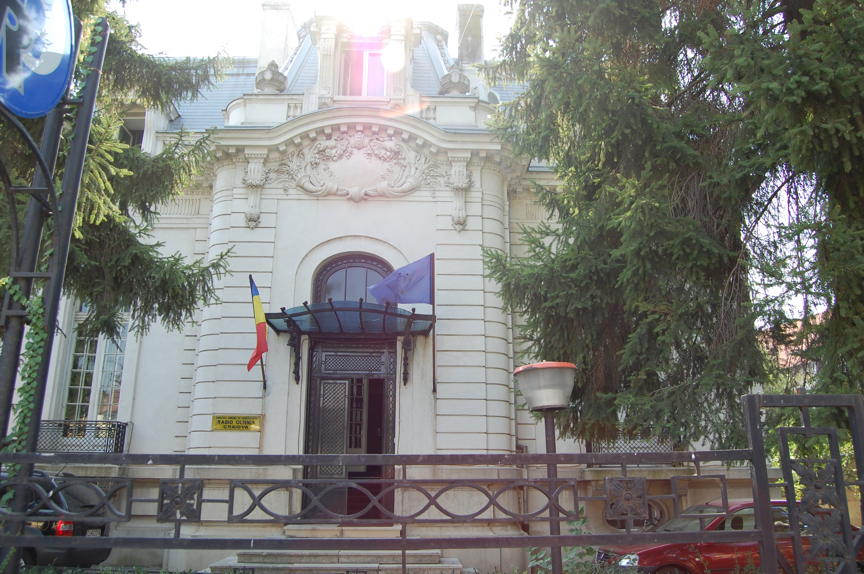 Marascu House, built in 1912, Craiova